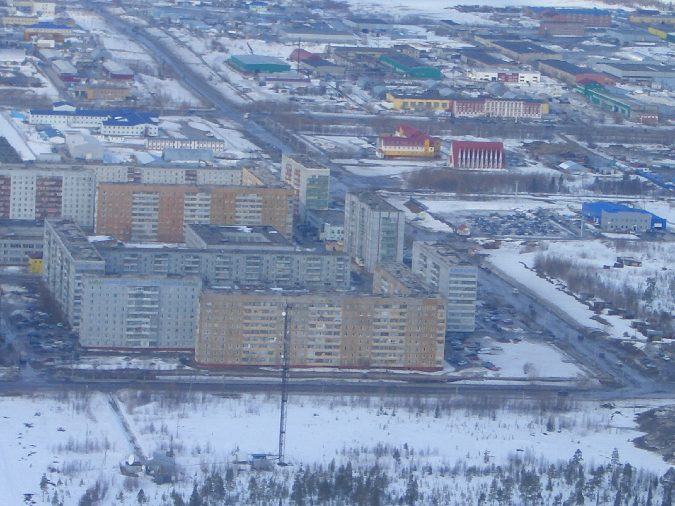 Усинск, вид с птичьего полёта